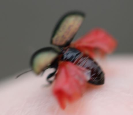 Chrysolina hyperici am 11.10.2017 in der Schwetzinger Hardt, kurz vor dem Abflug